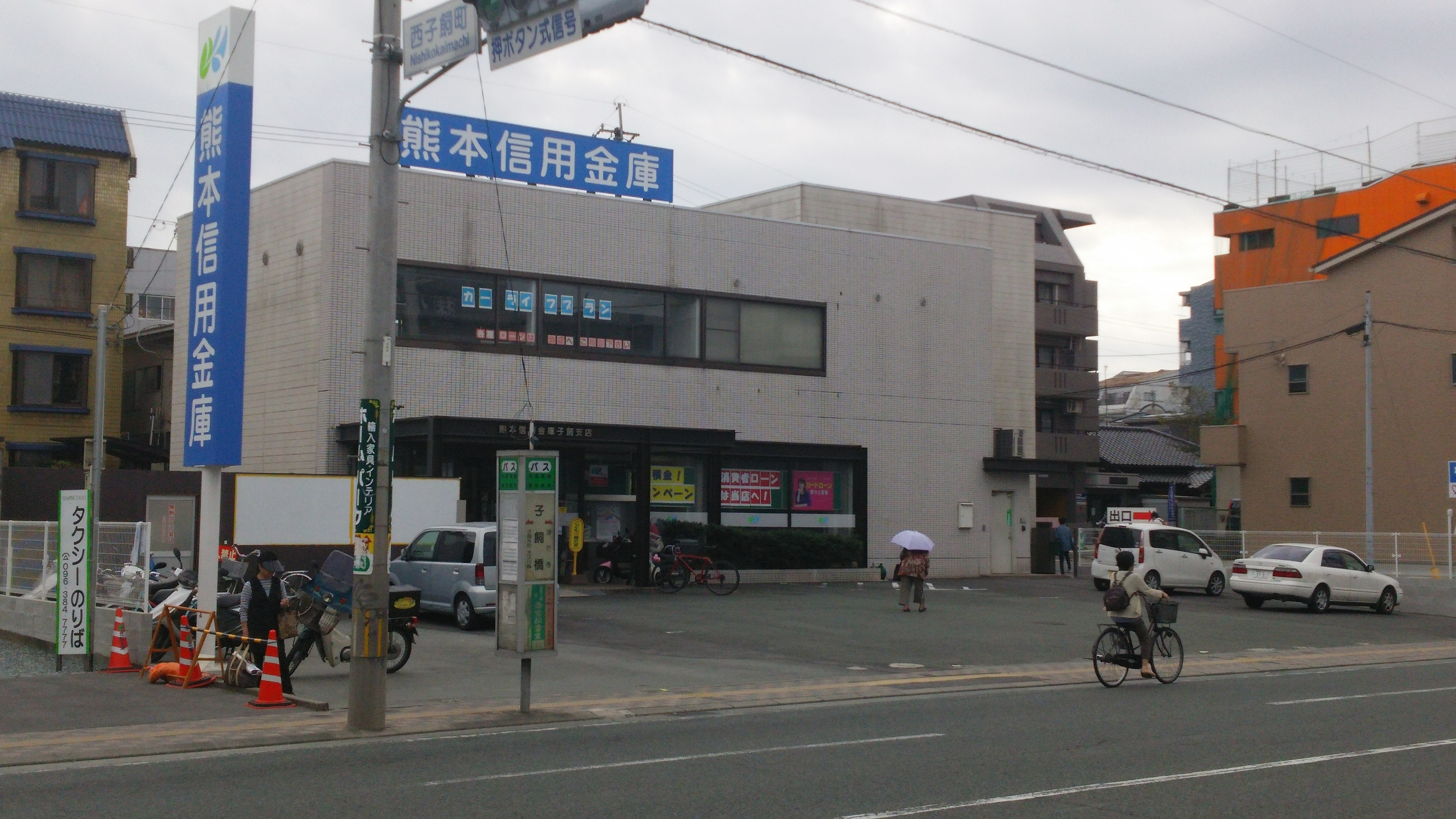 熊本信用金庫子飼支店（熊本市中央区）